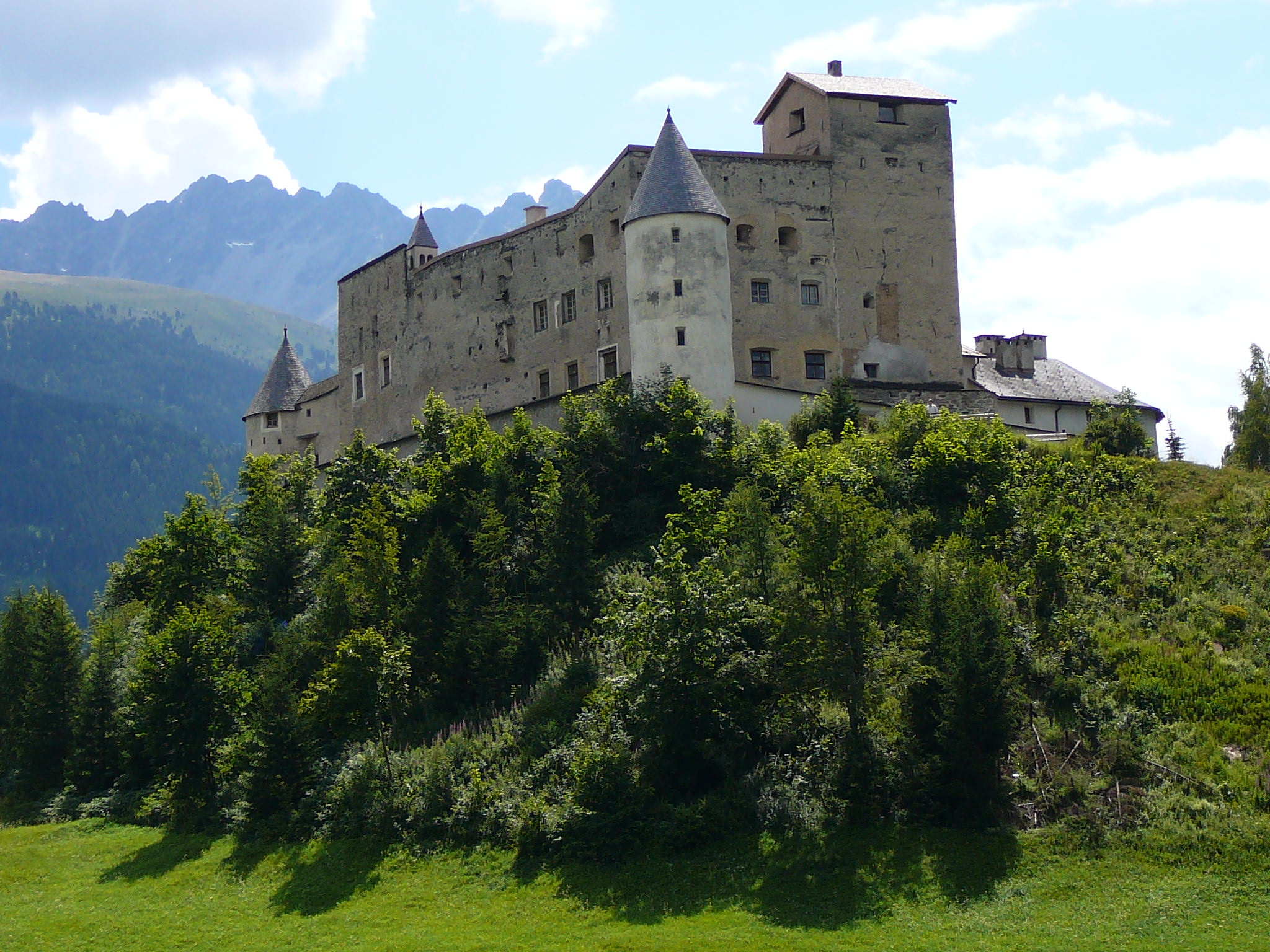 Castello di nauders